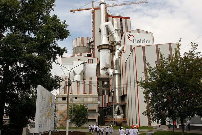 Корпуса завода «Щуровский цемент»